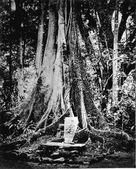 Foto. Sesajen di Kawali